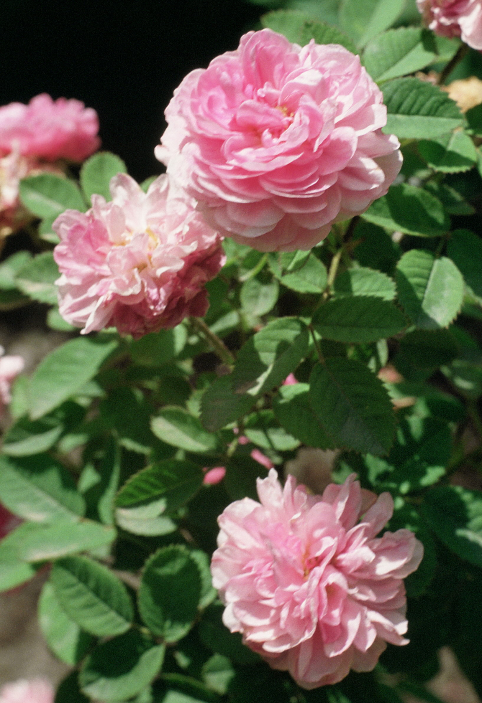 Rosa 'Rose de Meaux', gr. Centifolias, sect. Rosa. Real Jardín Botánico, Madrid